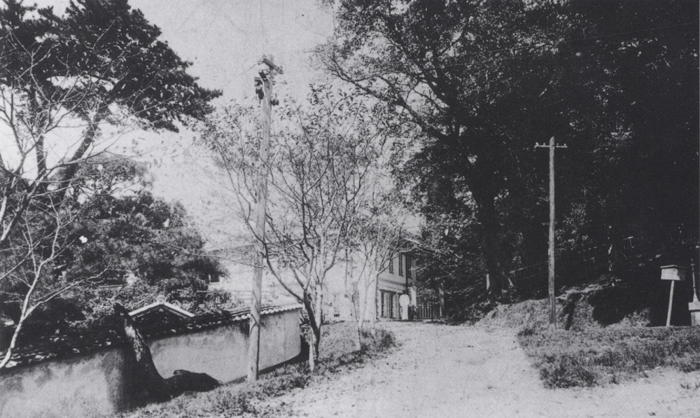 大正時代に撮影された長崎県立図書館（長崎県長崎市）。